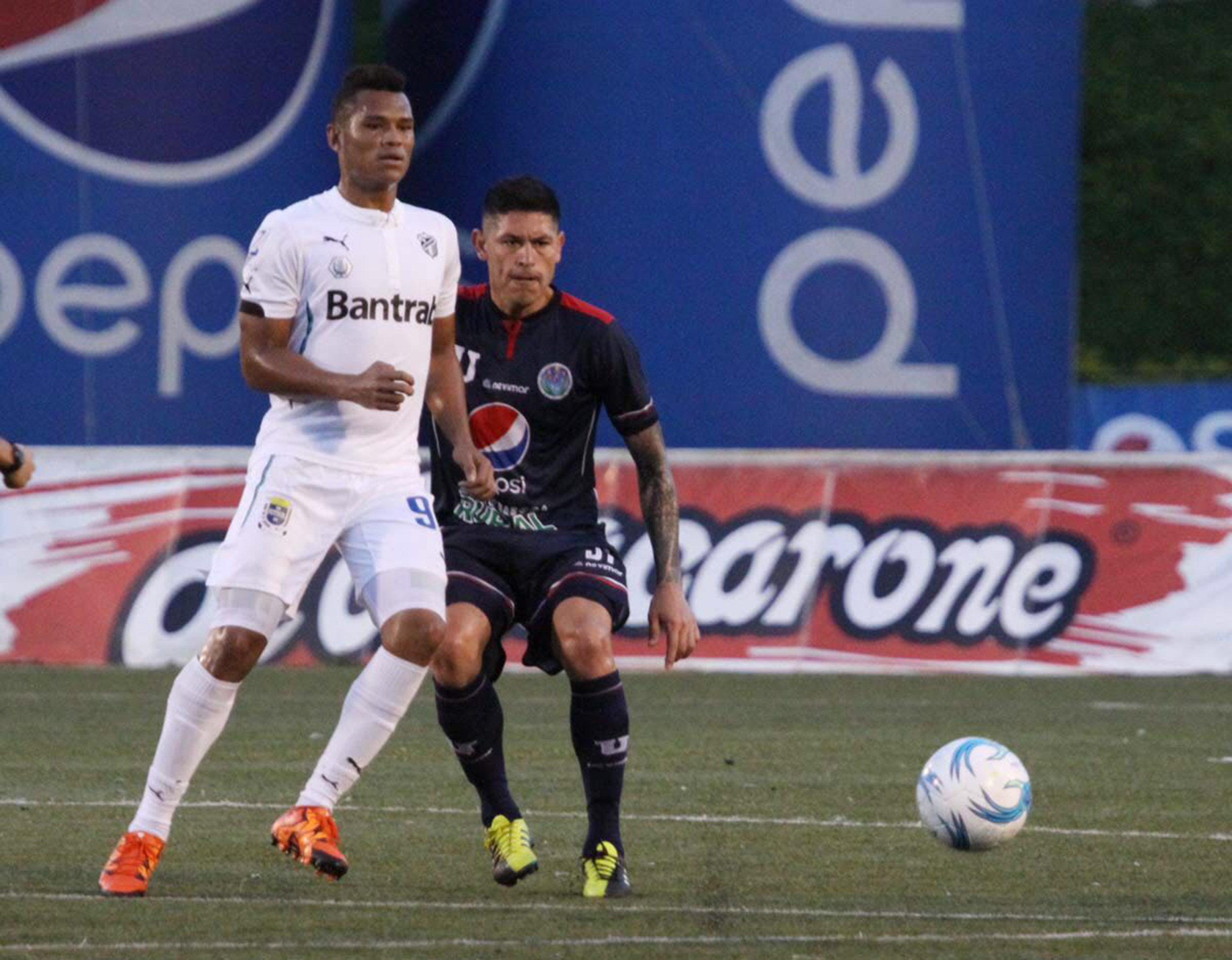 Marca a Presión!!! Paulo Centurión de cerca con la mirada fija ante el movimiento de Rolando Blackburn.